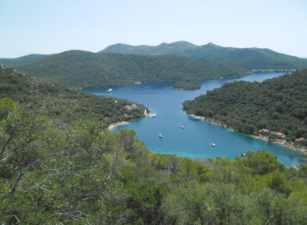 pogled na Pasadur (Lastovo) s Jurjeva vrha